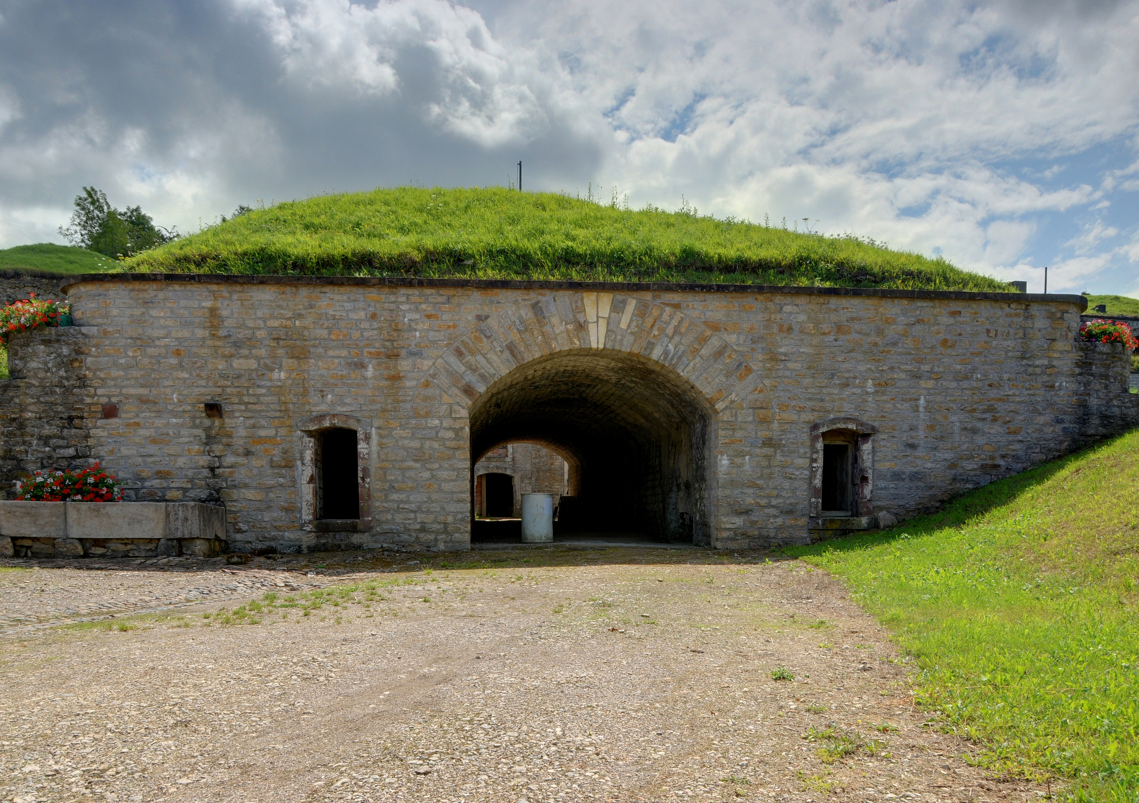 Fort des Basses Perches Basses perches fortifications.